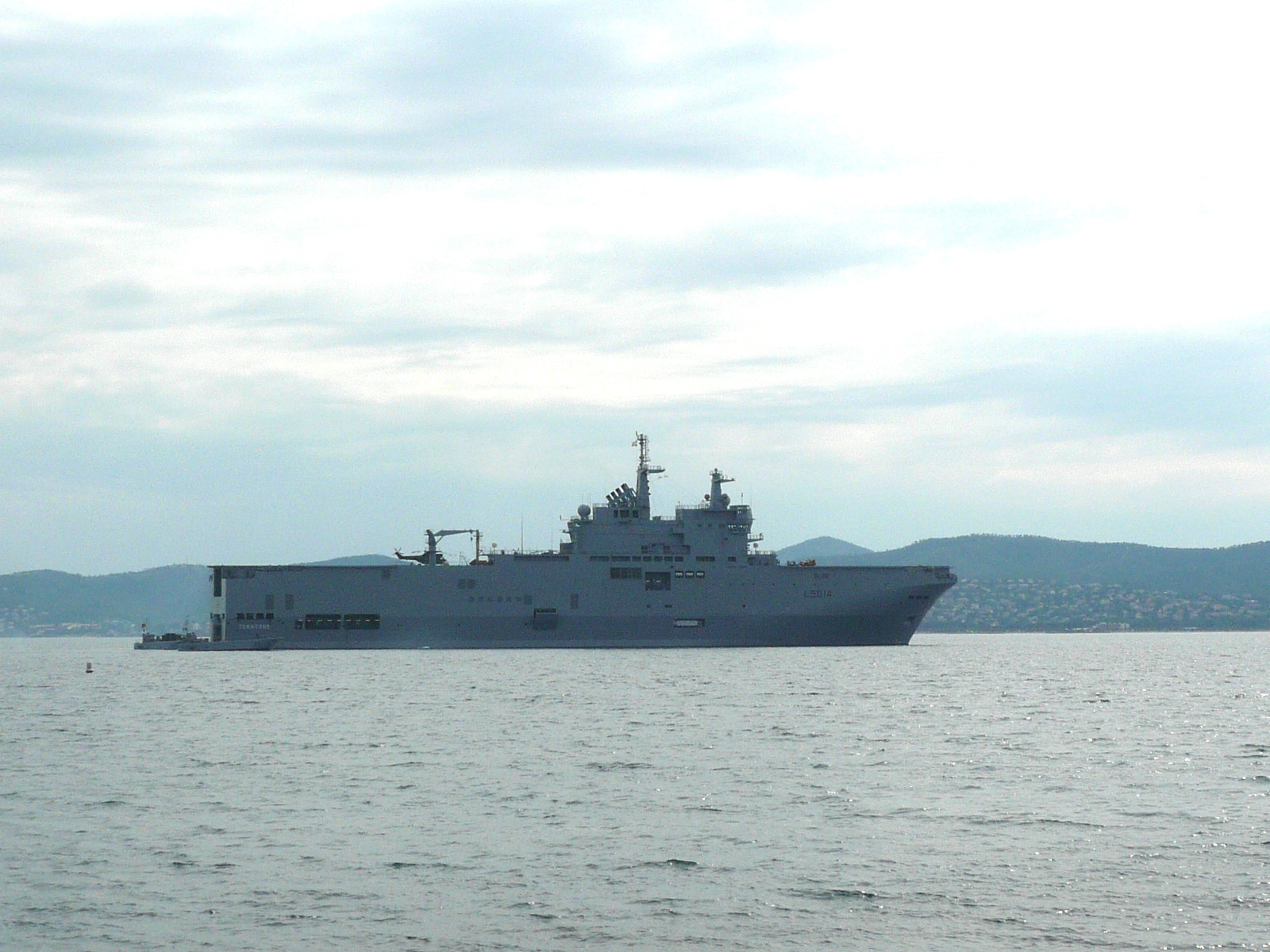 Le Tonnerre en face de Saint-Raphaël